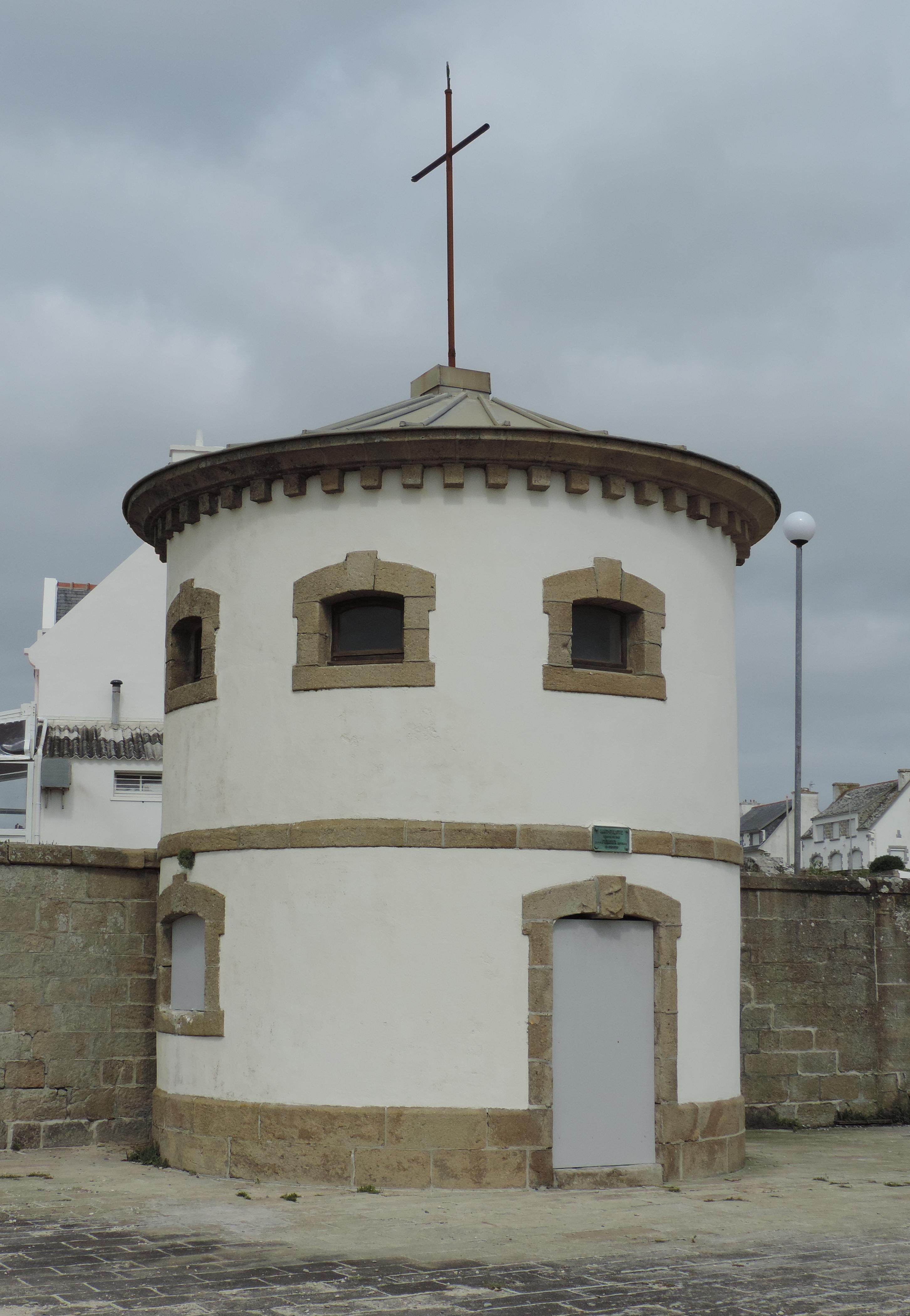 Mât Fenoux d'Audierne. Le mât de nos jours.